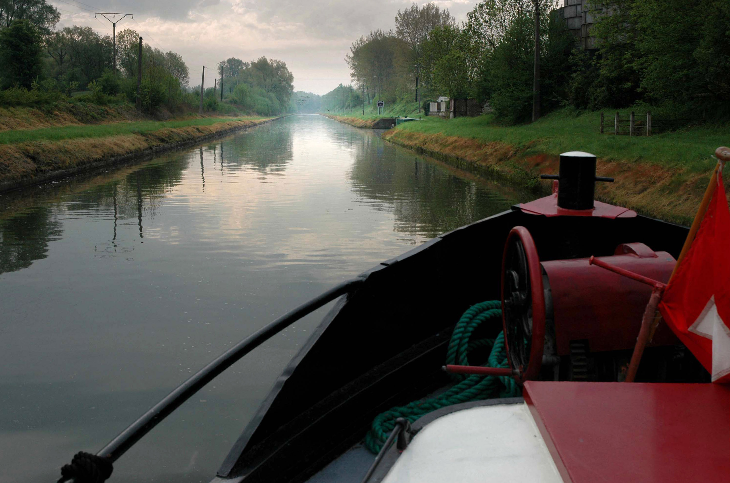 Het Bourgondisch Complot, televisieprogramma voor de Belgische zender Canvas. De 'Maria van Dam' nadert de tunnel van Riqueval (F).